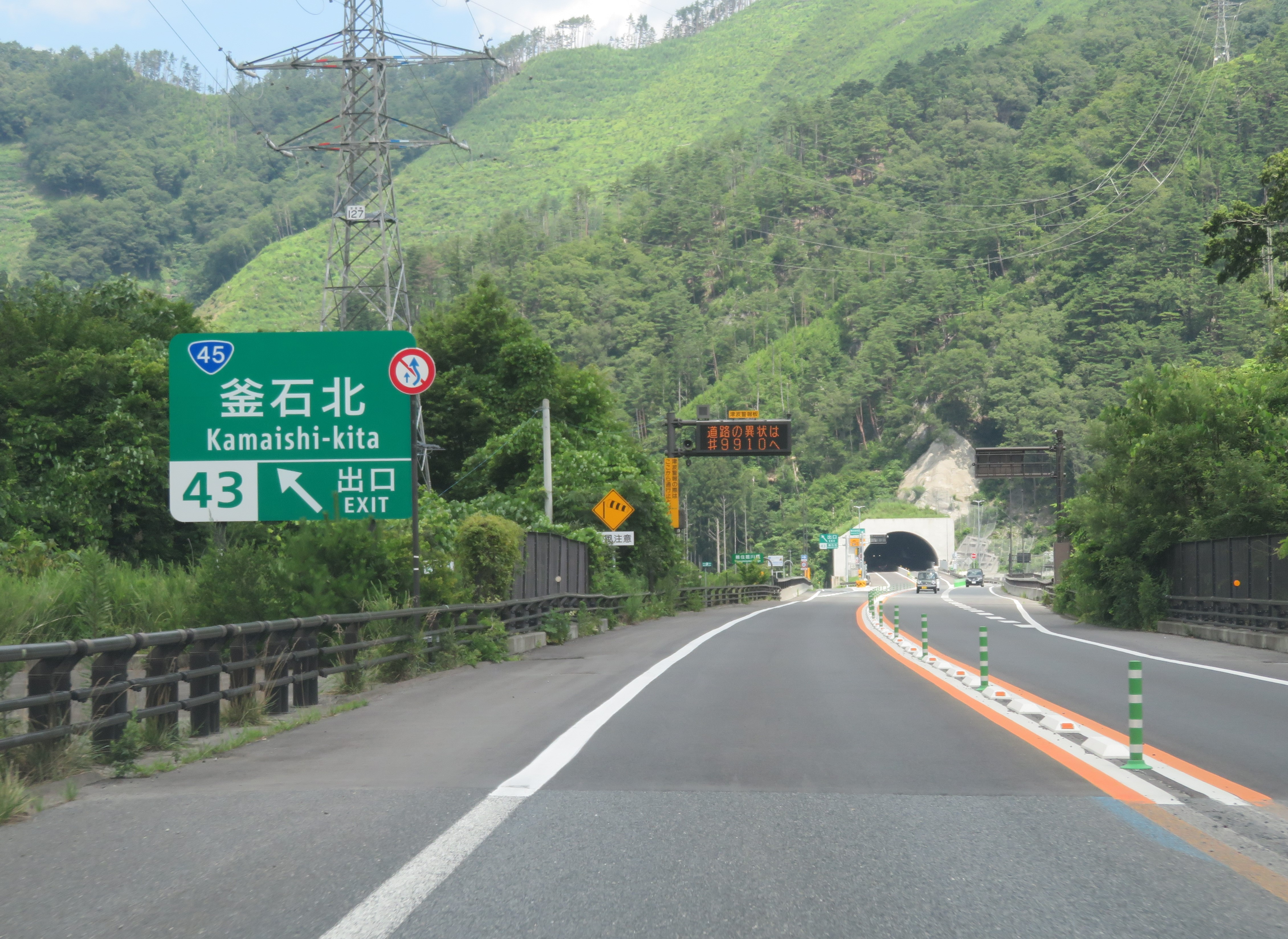 三陸自動車道釜石北インターチェンジ出口付近（釜石ＪＣＴ方面側から撮影）